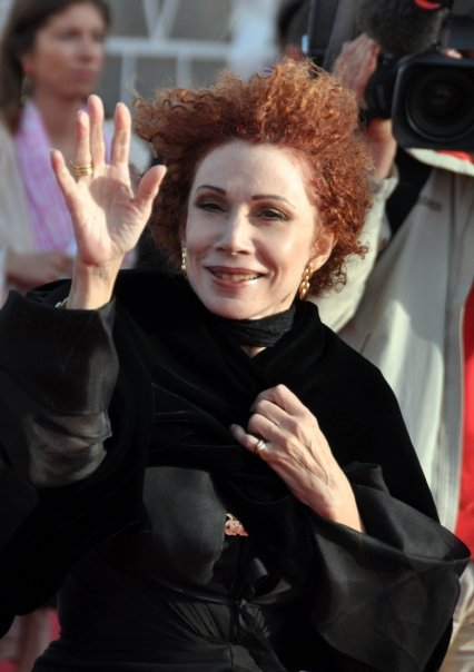 Julia Migenes au festival de Deauville en 2009.